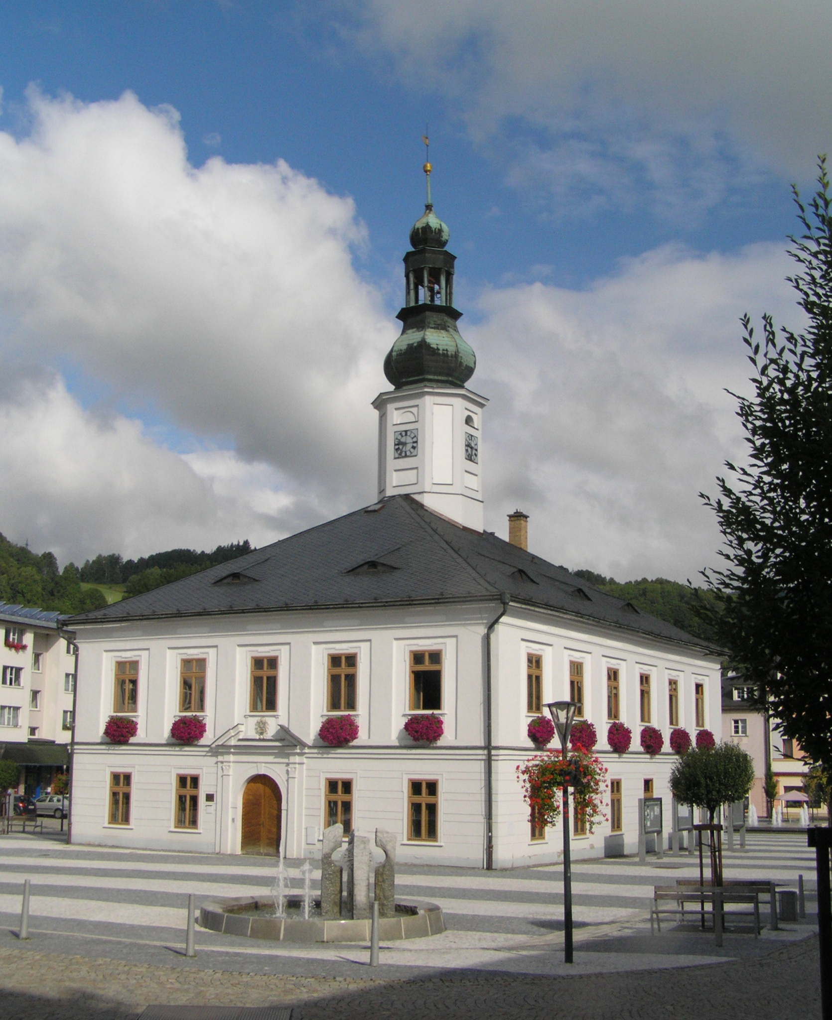 Radnice (Jeseník, okr. Jeseník)